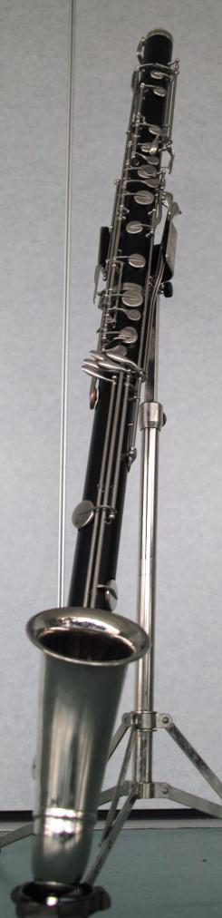 Photographie de face d'une clarinette contralto